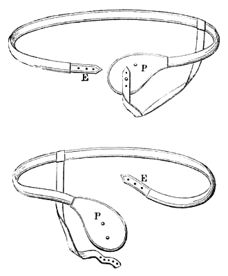 Bruchbänder mit Einer Pelotte. P = Pelotte E = Ergänzungsriemen